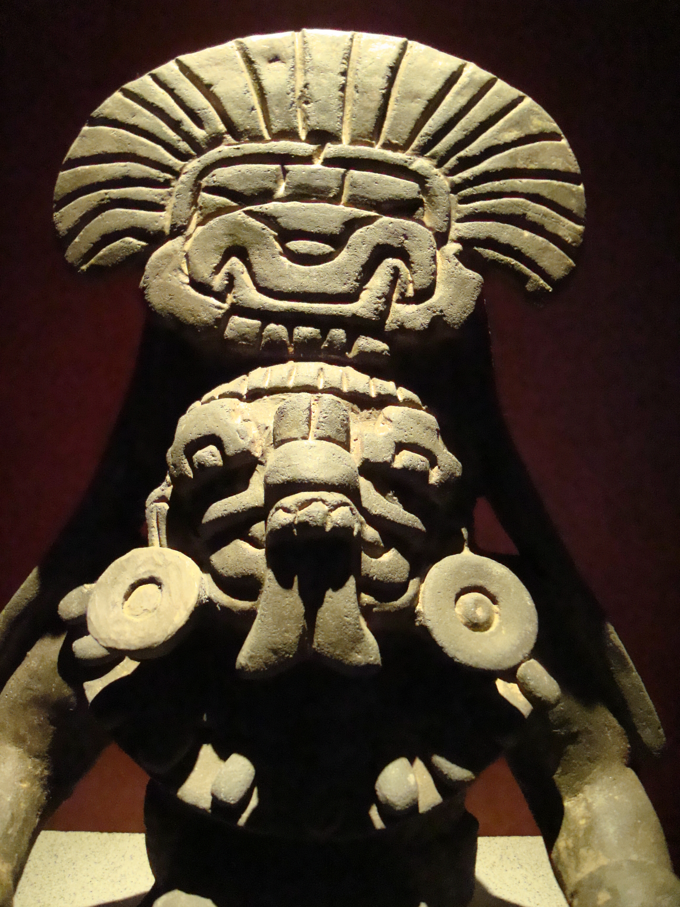 Urna zapoteca que representa al dios Pitao Cocijo, señor de la lluvia y del agua, principal dios zapoteca de la era precolombina. Procede de Monte Albán (aprox. ss. II-VII d. C.). Se encuentra en exhibición en la sala de Etnografía de los pueblos de Oaxaca, en el Museo Nacional de Antropología de México.